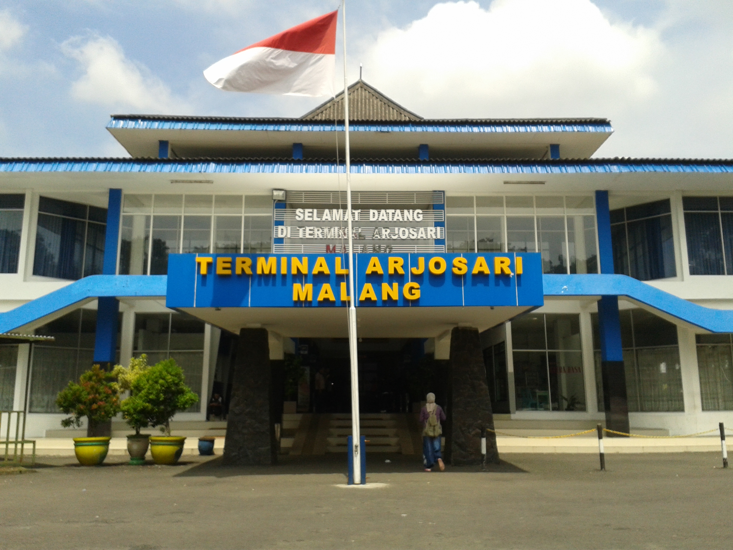 Tampak-depan-terminal-Arjosari-Malang sumber